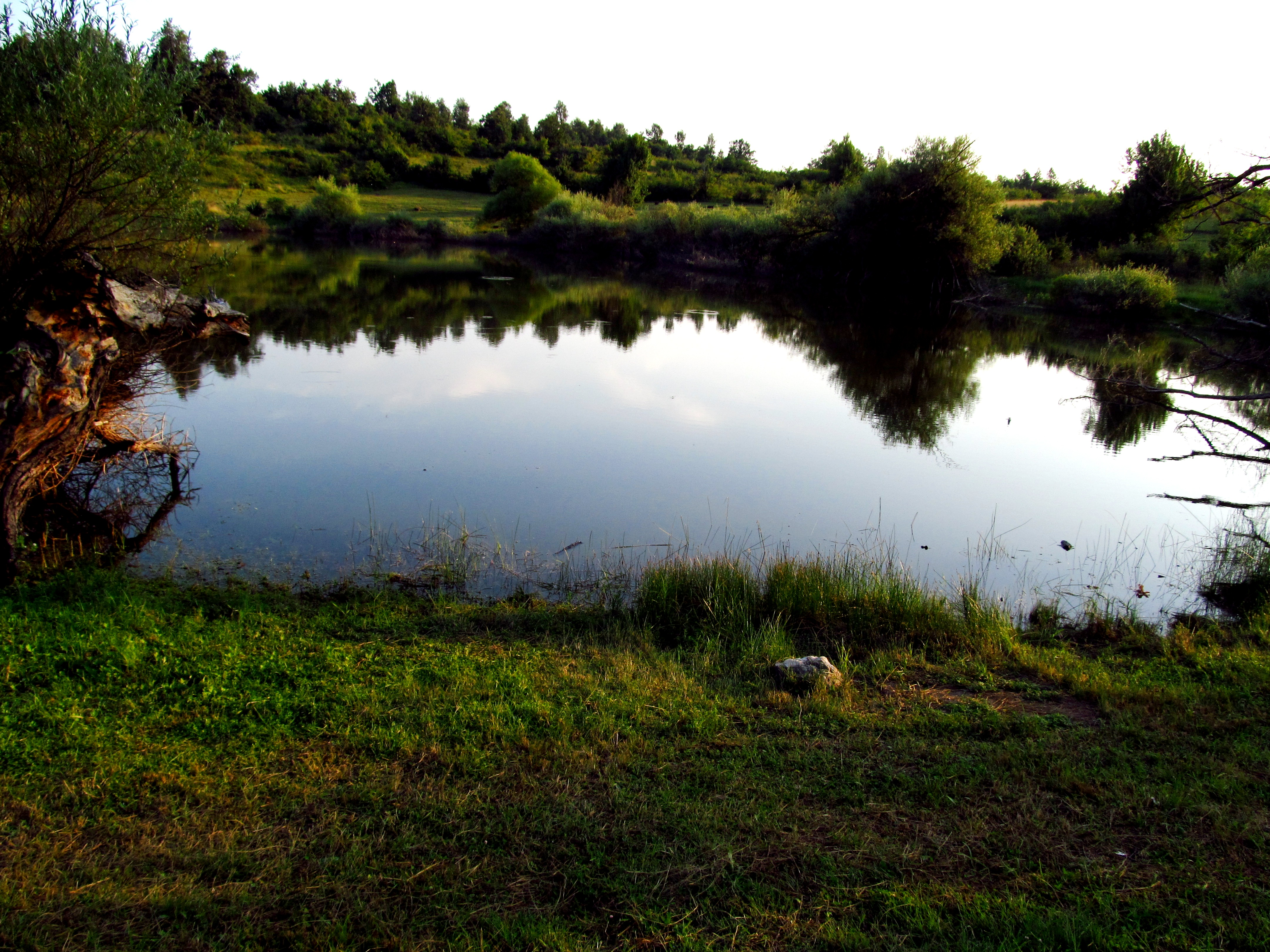 Srpski (latinica): Vrmdžansko jezero